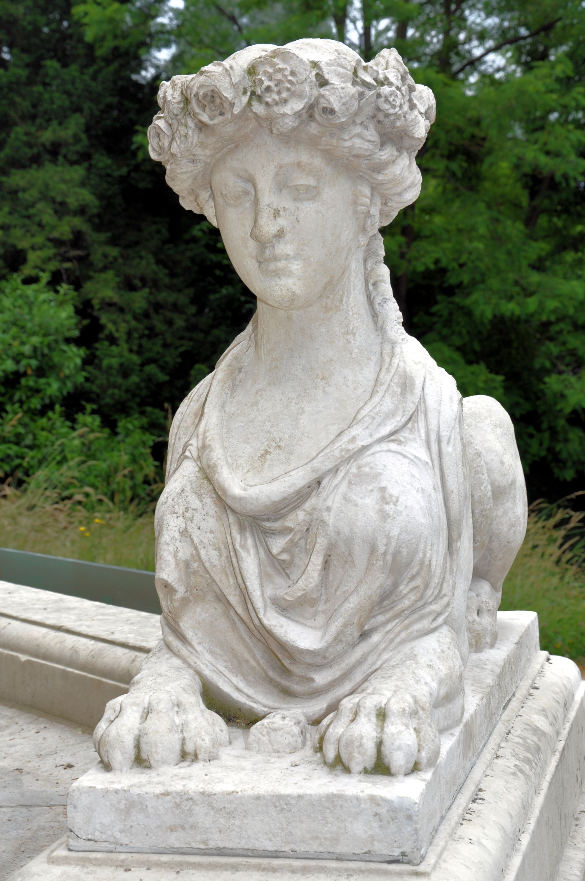 Belvédère du Petit Trianon - Sphynge symbolisant le printemps